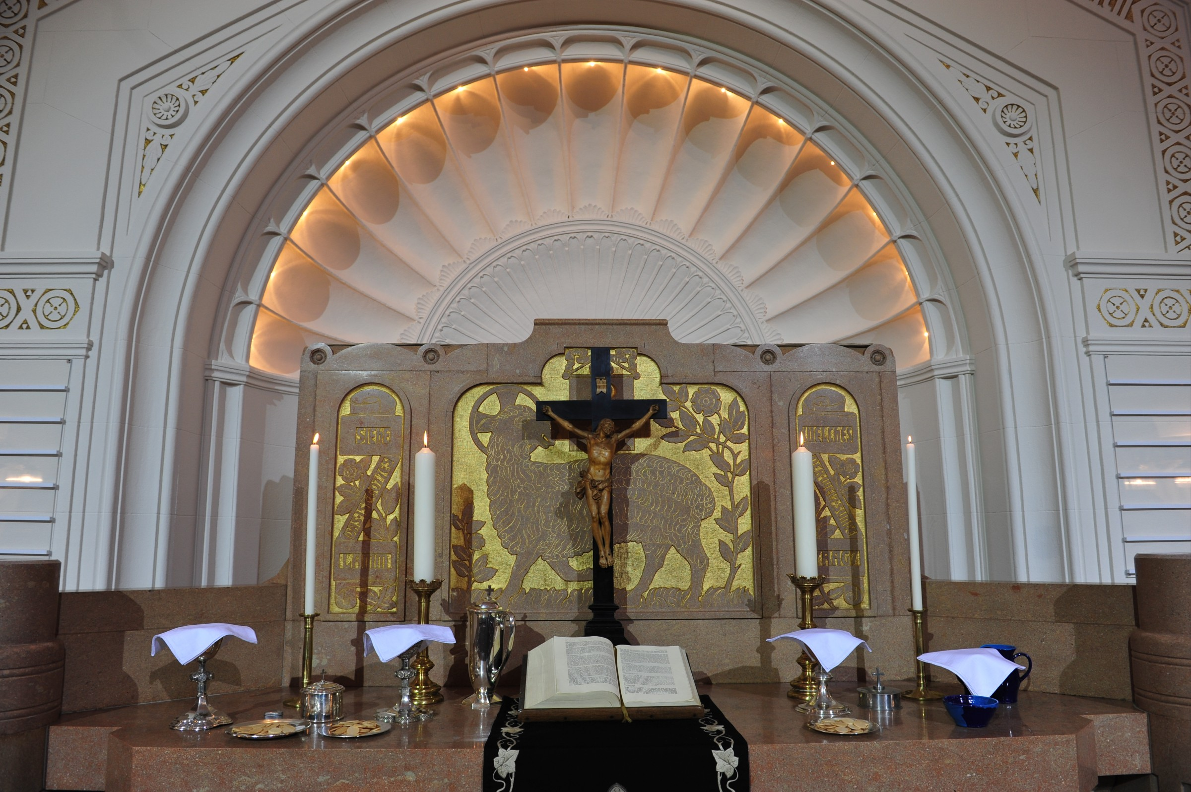 Innenraum der Gustav-Adolf-Kirche in Leoben.